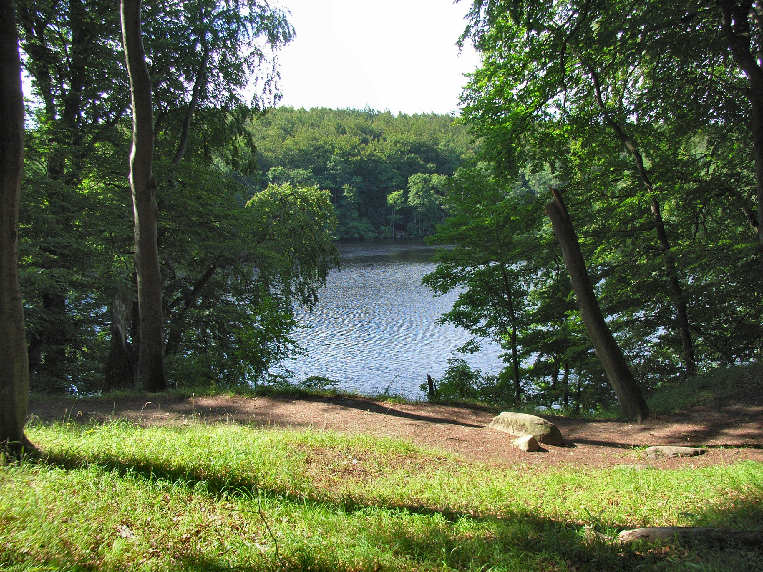 Blick aus der Herthaburg über den Herthasee im Nationalpark Jasmund auf der Insel Rügen